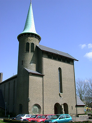 Limburgs: Hubertuskèrk in Groat Genhout